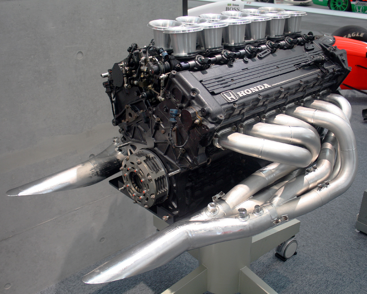 Honda RA121E engine (Formula One)